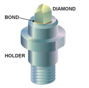 nanoindenter holder